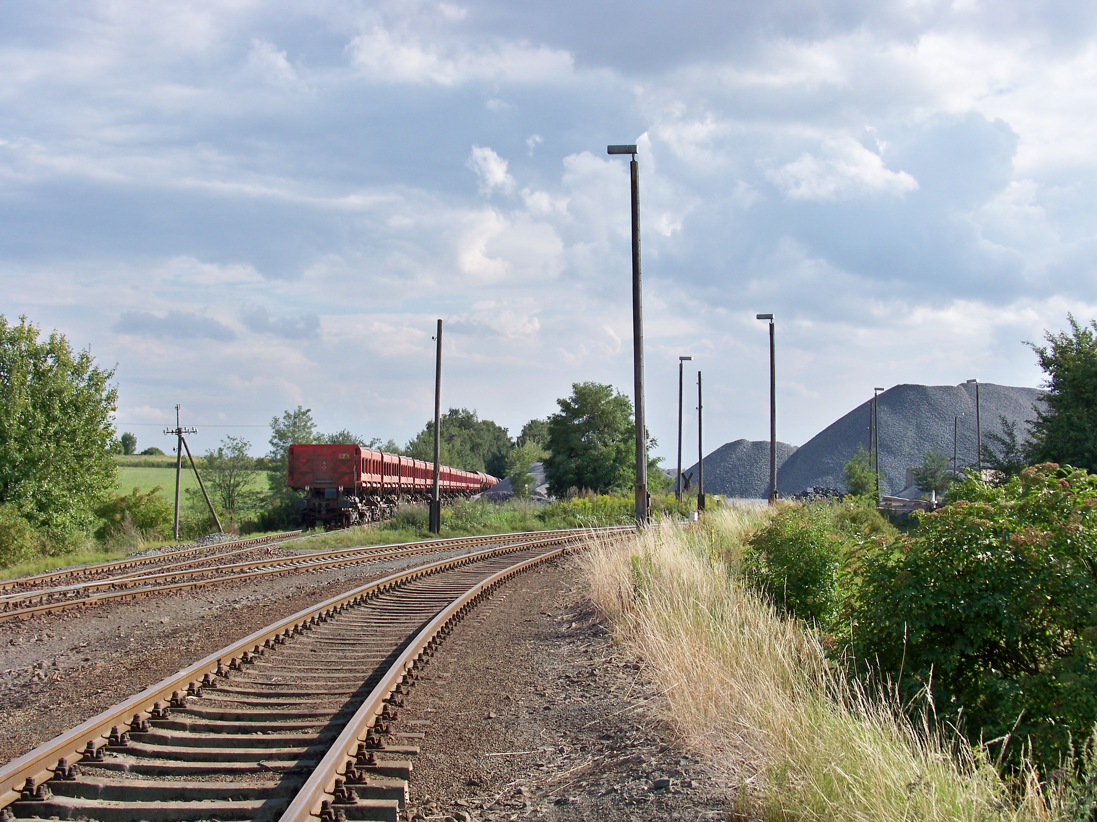 Abzweig zum Schotterwerk Lüptitz aus dem Bahnhof Lüptitz. Auf dem alten Streckengleis Richtung Wurzen sind Güterwagen abgestellt, wenige hundert Meter weiter ist die Strecke gesperrt und kurz vor Wurzen bereits demontiert.